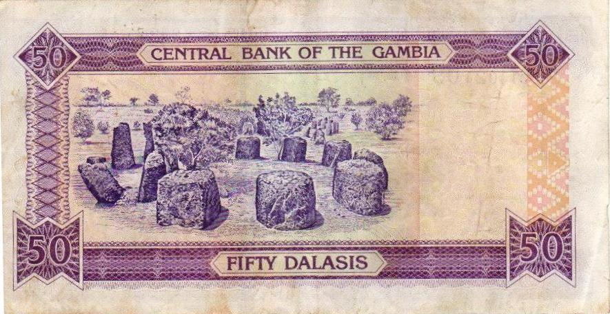 50 dalasi